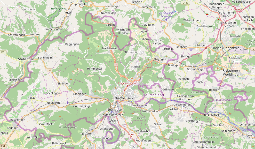 Heutiger Grenzverlauf zwischen Baden-Württemberg und dem Kanton Schaffhausen